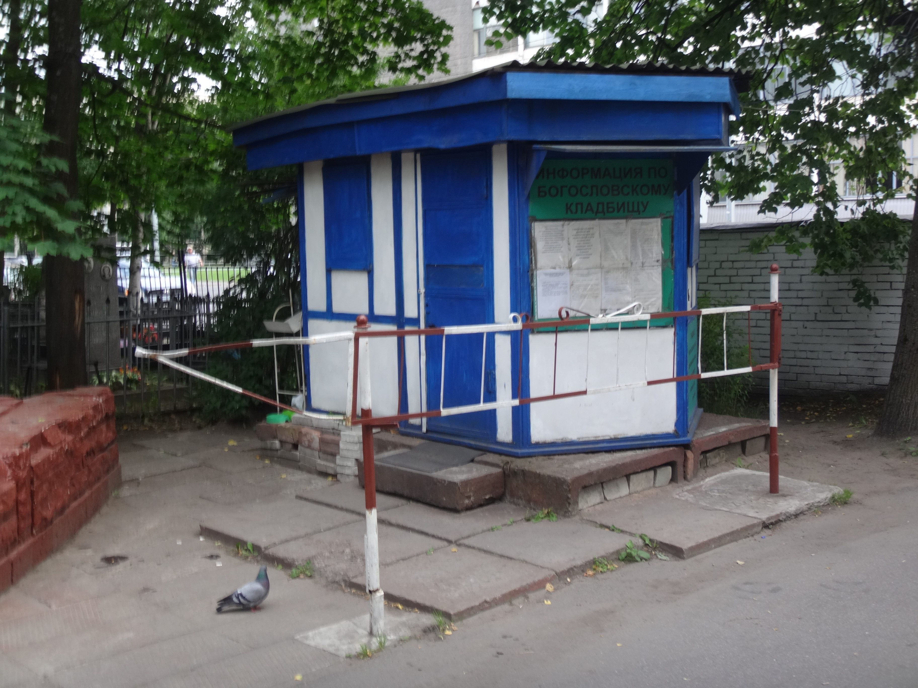 Будка кладбищенского привратника